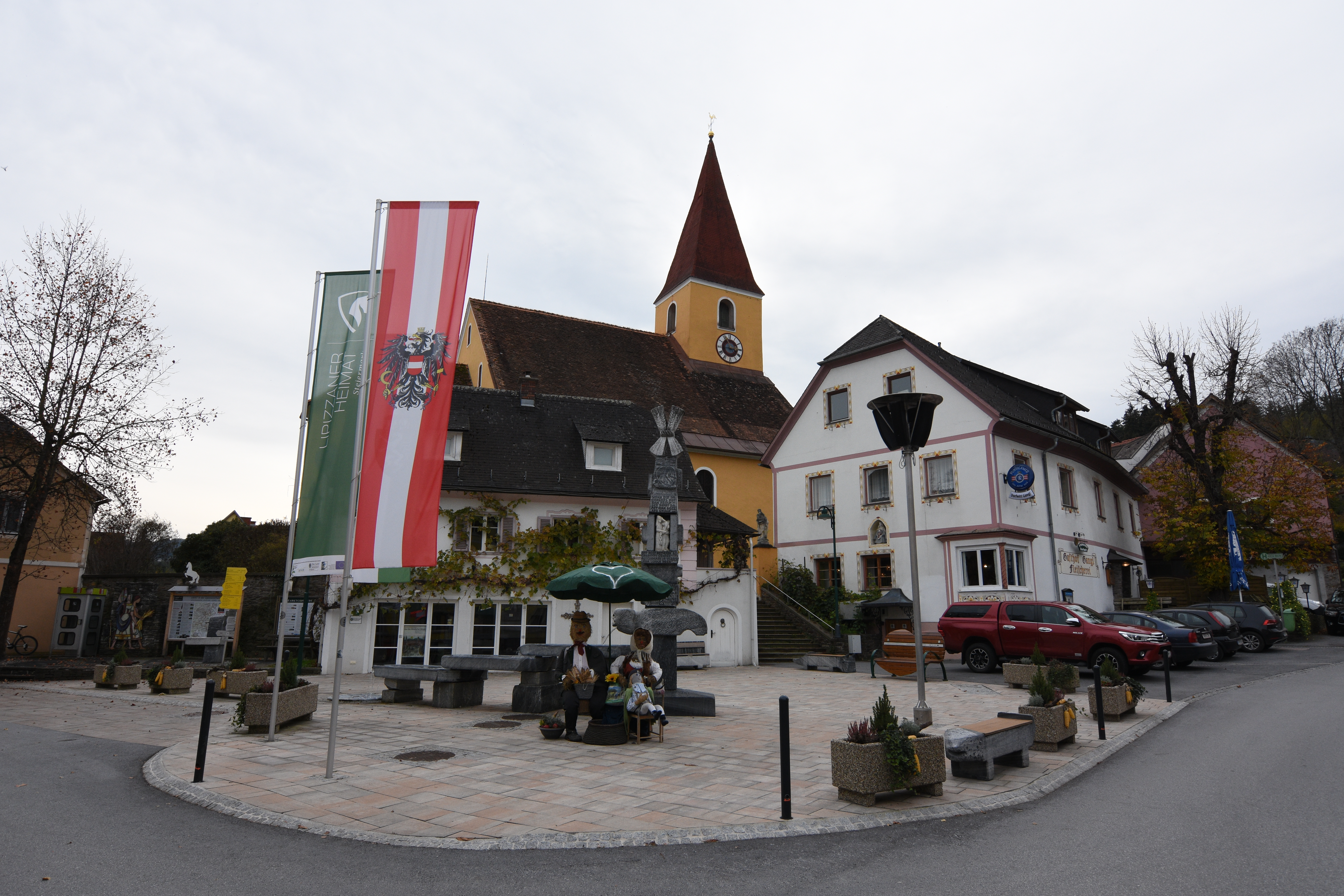 Ligist